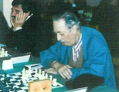 Rui Nascimento, problemista de xadrez português, aos 78 anos. Rui Nascimento, portuguese chess composer, at age 78.